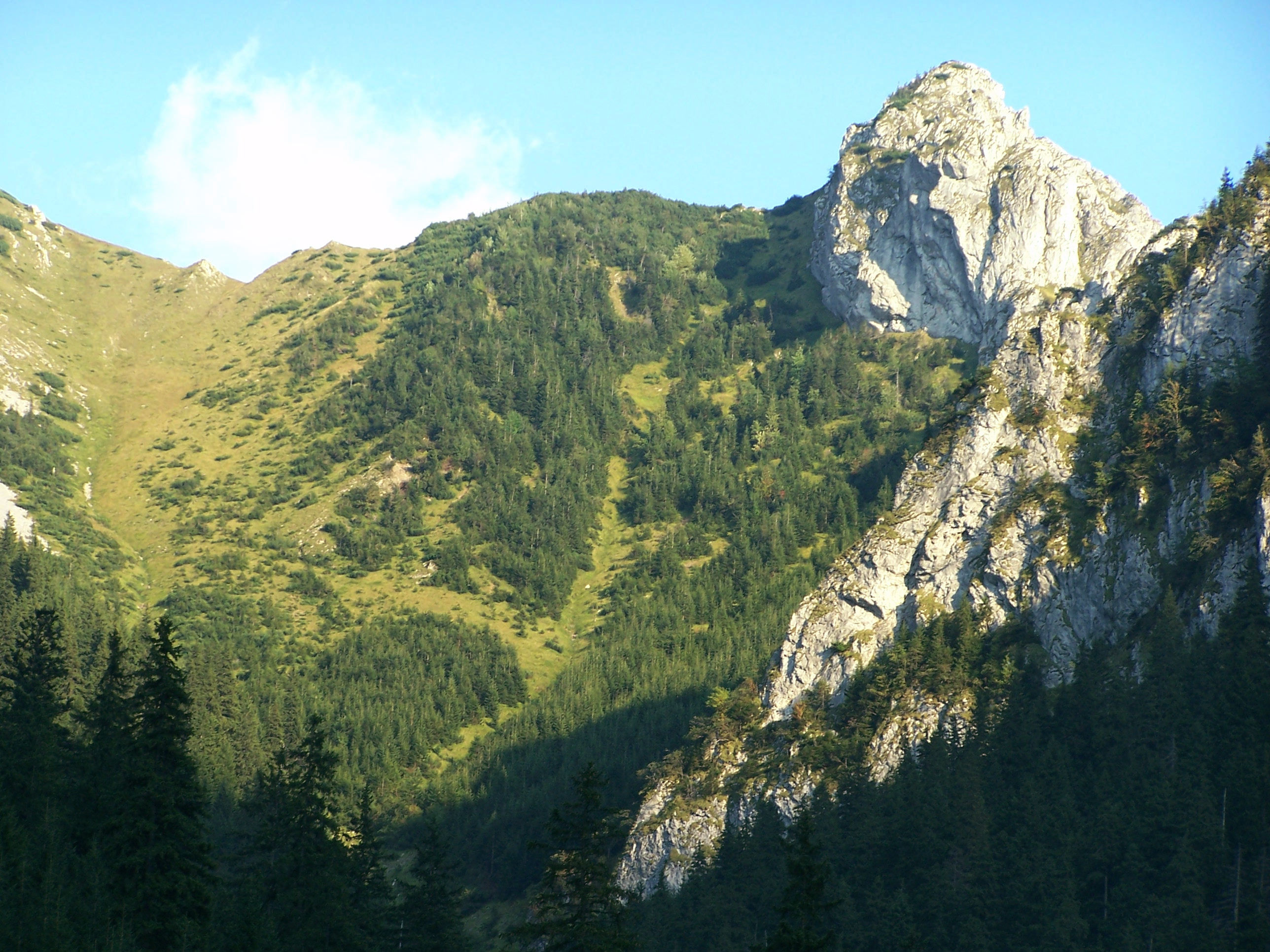 Upłazkowa Turnia (Tatra Mountains)